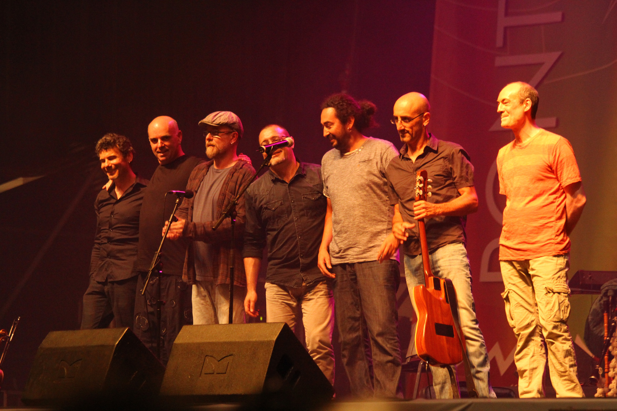 Concert of the Galician folk music group Berrogüetto at feast of La Peregrina of Pontevedra August 15, 2013.